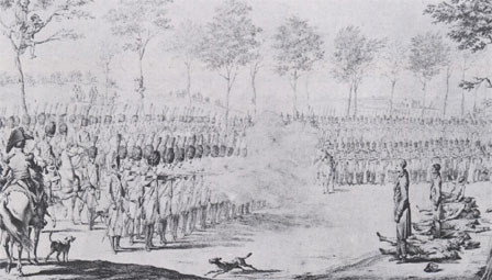 Claude François de Malet et ses complices sont fusillés le 29 Octobre 1812. “Claude François de Malet”, Biographie des célébrités militaires des armées de terre et de mer de 1789 à 1850, (Charles Mullié, 1851).